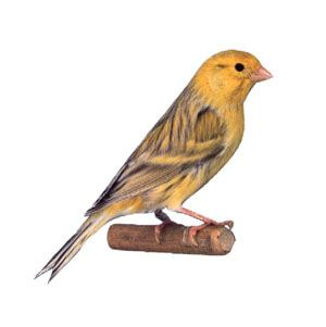 pigment voorkoming